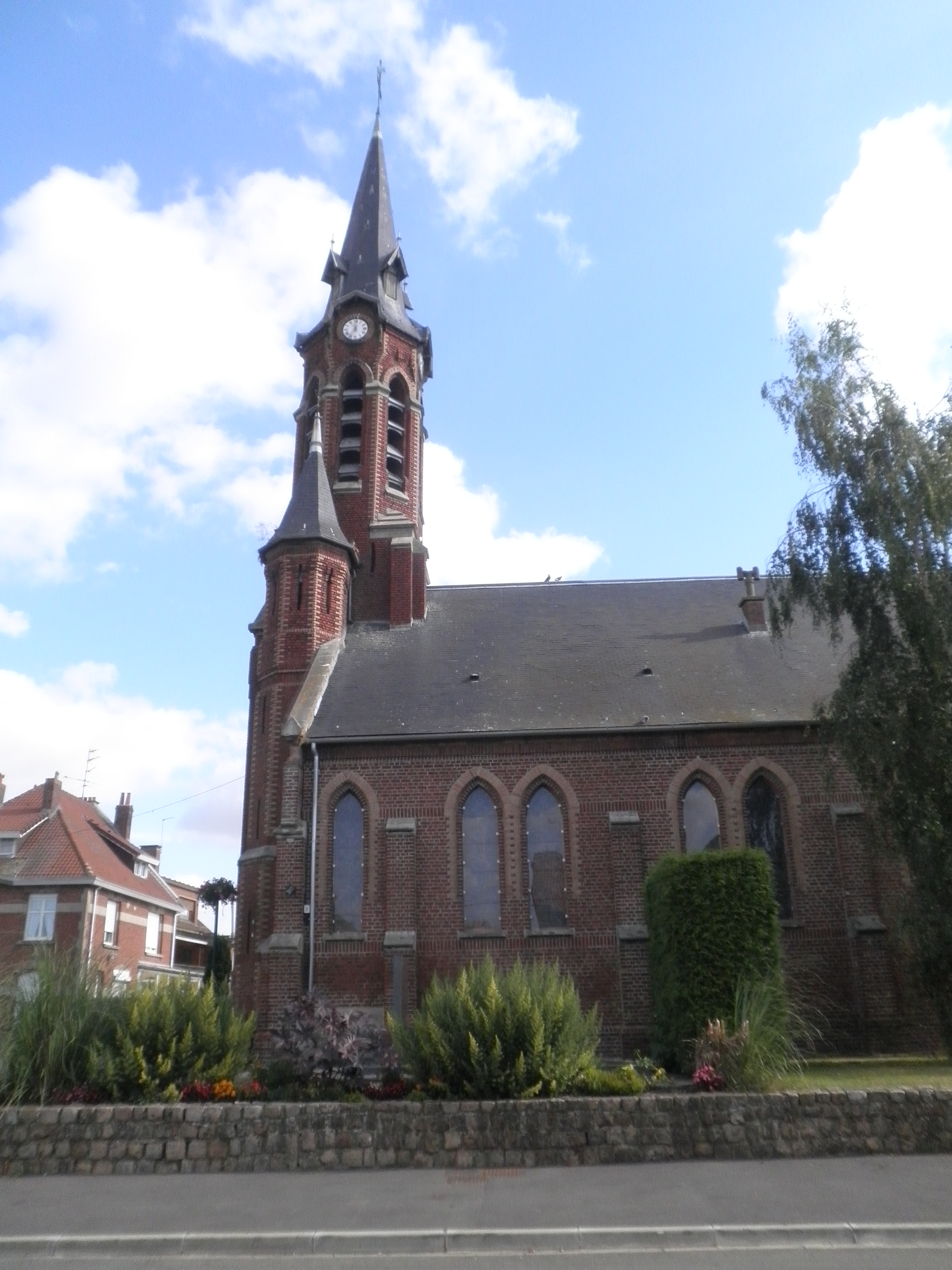 Église Sacré-Cœur, dans le hameau du Nouveau Monde, à La Gorgue, construite en 1929.